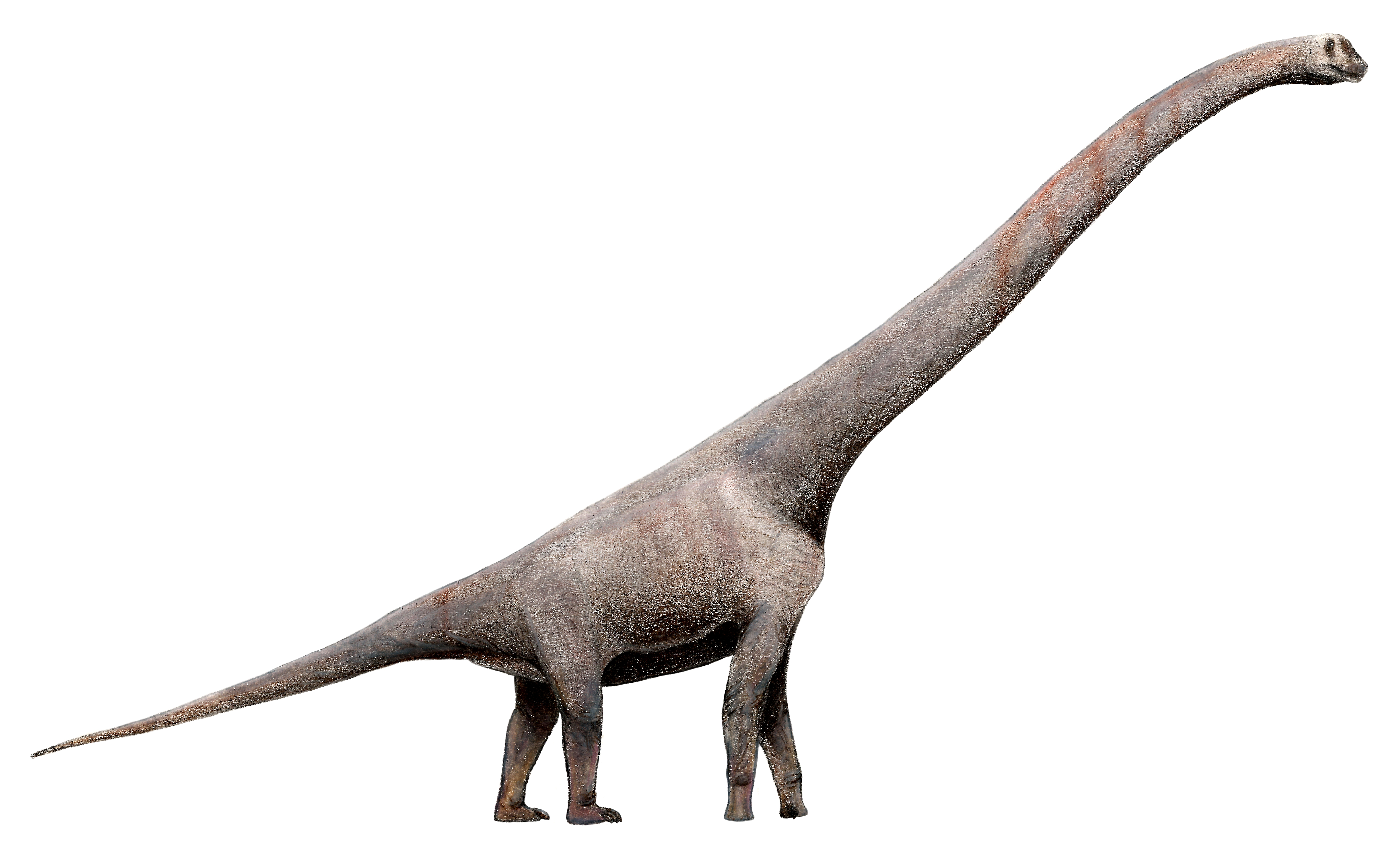 Recreación de un Sauroposeidon proteles.